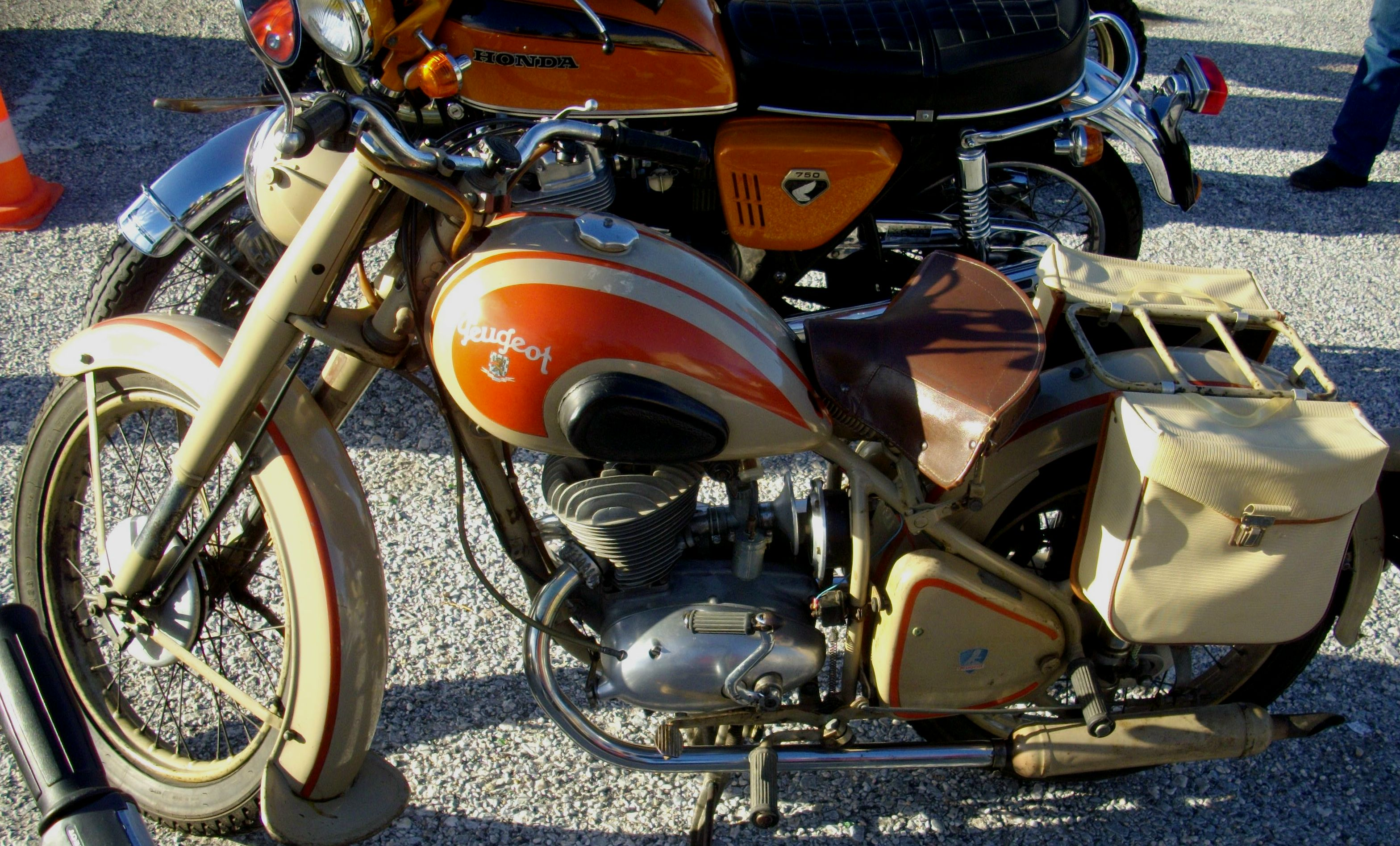 PeugeotTyp 176 TC4 von 1952